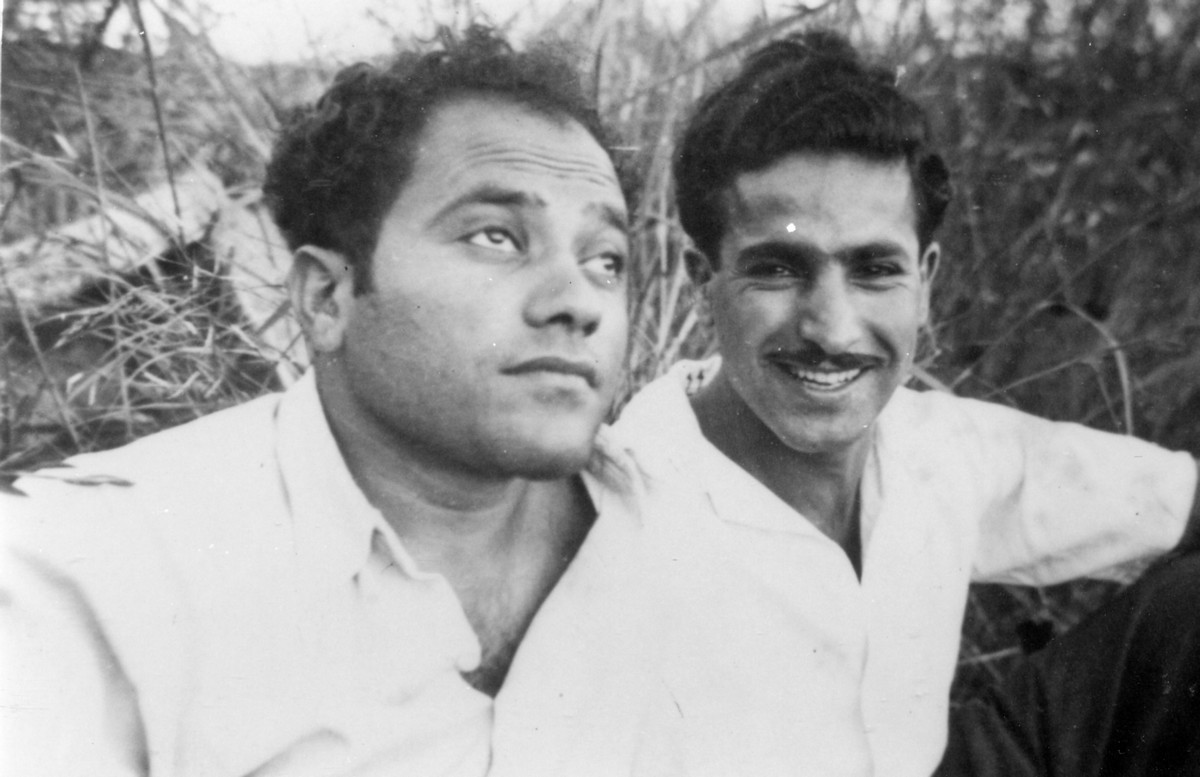 "השחר" המחלקה הערבית - המסתערבים באלונים 1943 - טרי ויעקובה מיחידת המסתערבים. שלום טרי (משמאל) ויעקובה (יעקב כהן).